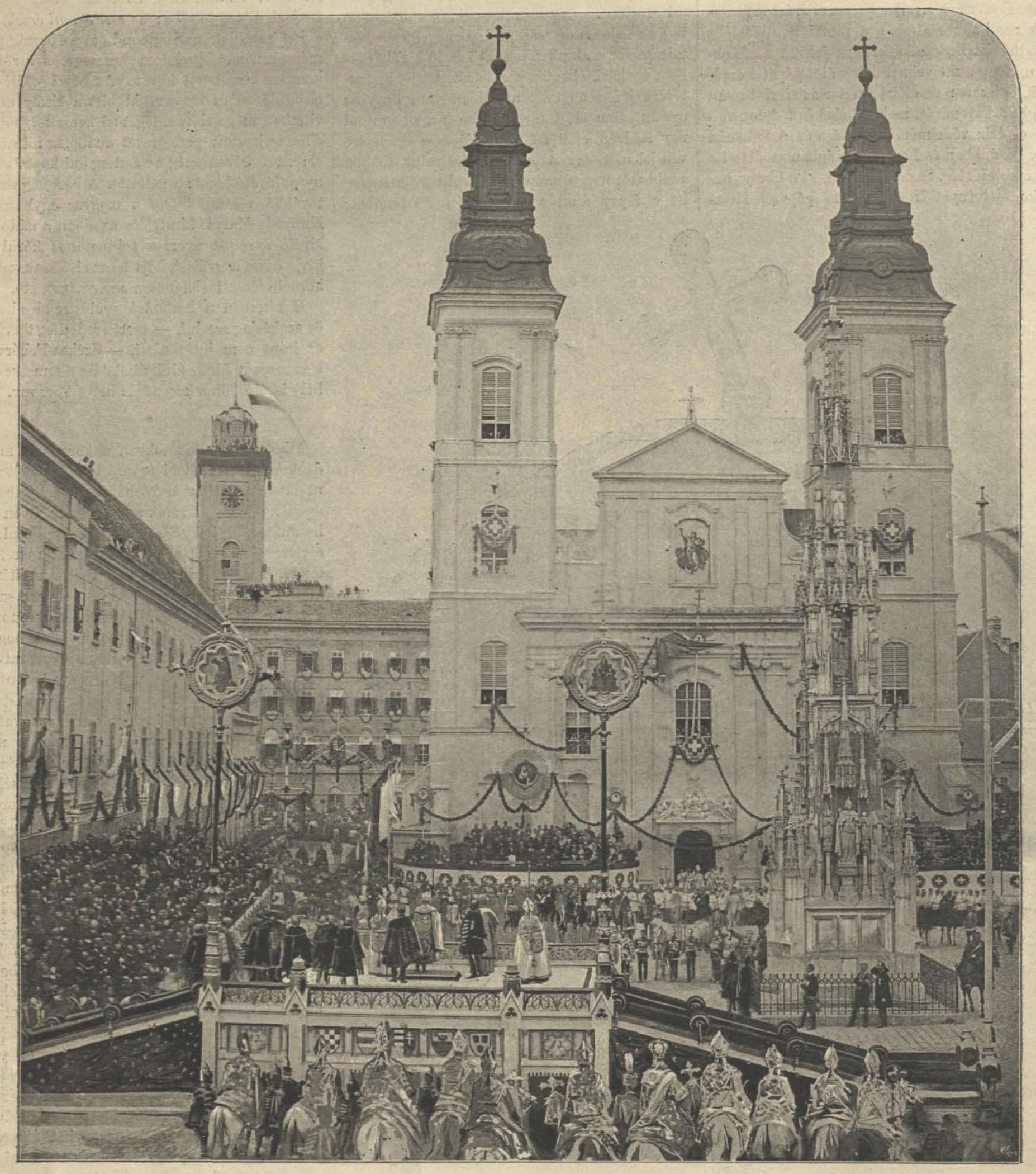 Ferenc József koronázási esküje 1867-ben